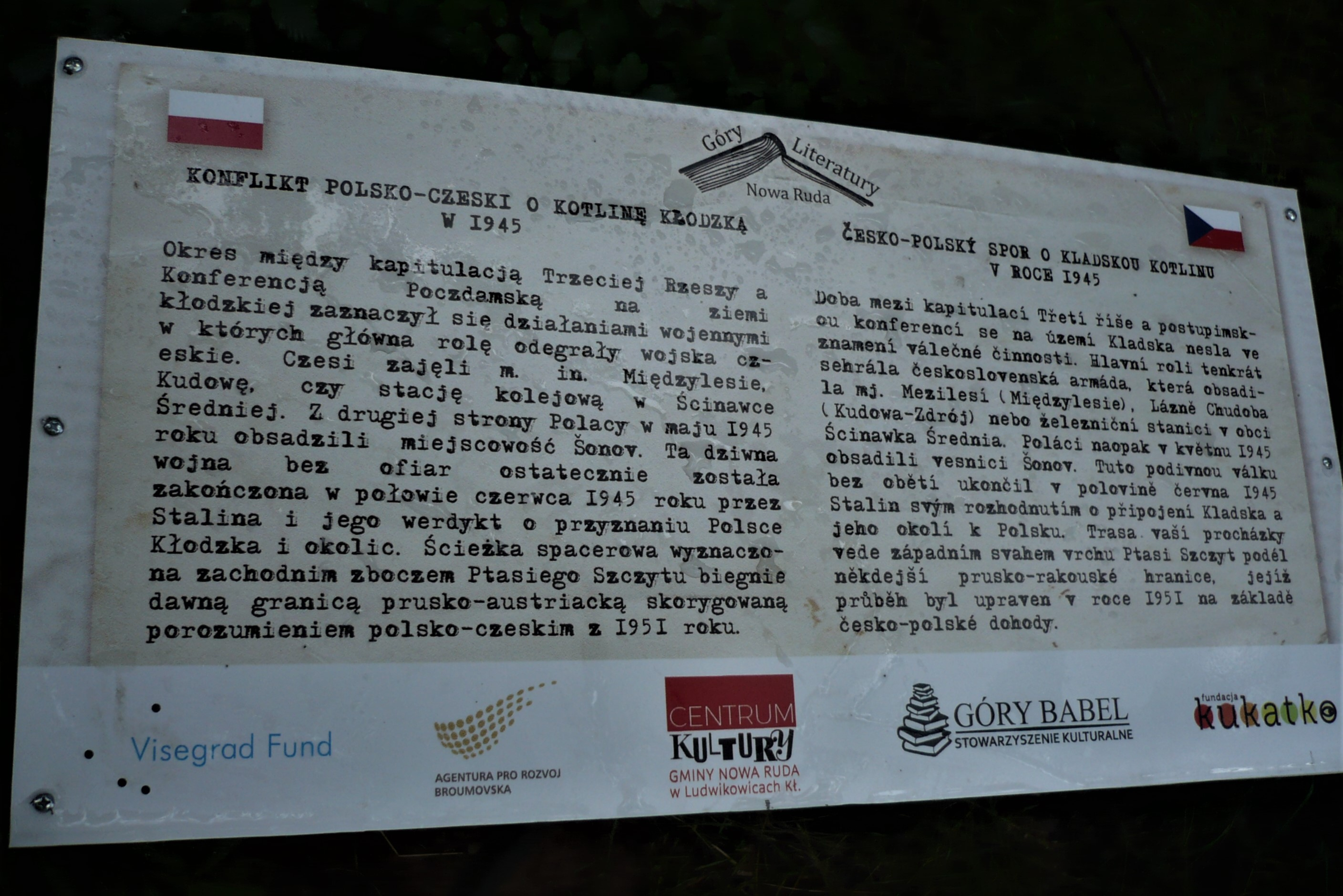 Tablica na Drodze Chlebowej Sonov - Włodowice